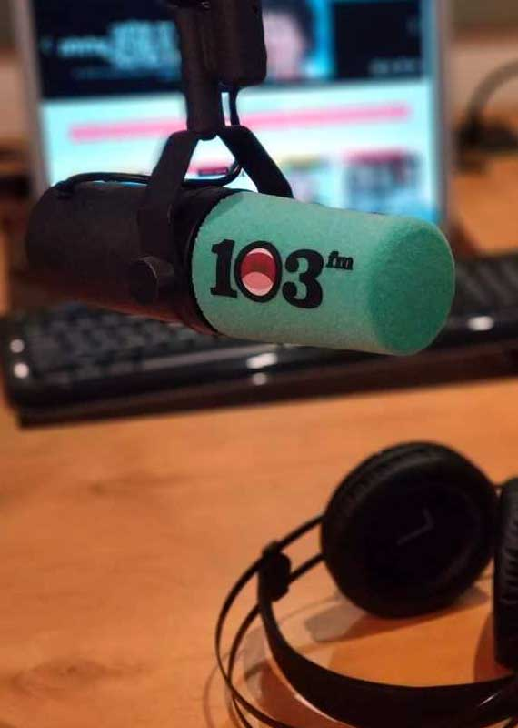 צילום: יניב מורוזובסקי/103fm 103fm Israel's Studio